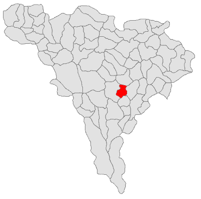 Categorie:Hărţi ale judeţului Alba